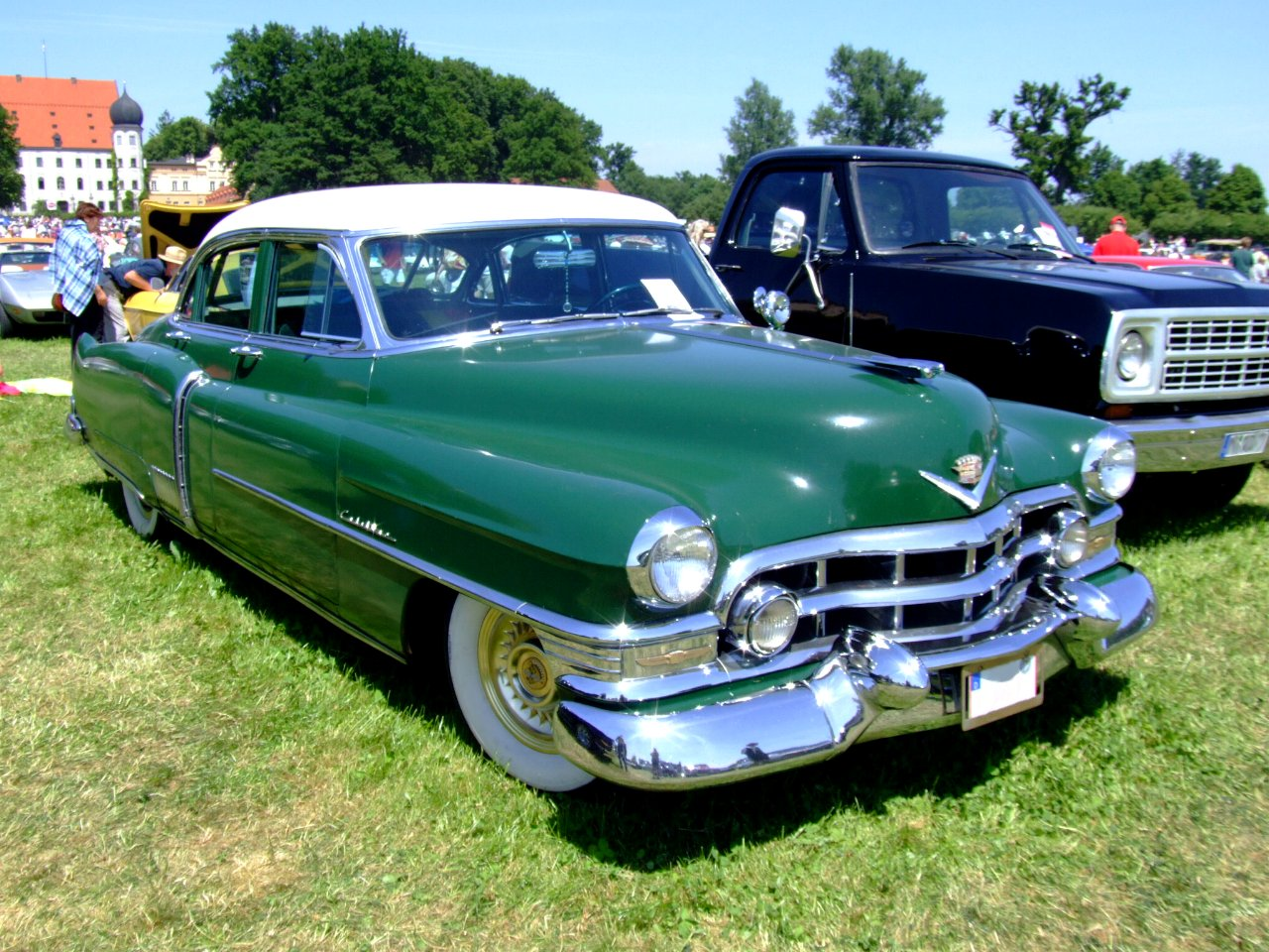 Cadillac Fleetwood 60Special Baujahr: 1952 Hubraum: 5,4 Liter Zylinder: 8 PS: 190 bhp / 4000 RPM Getriebe: 4-Gang Hydramatic Länge: 5,69m Gewicht: 1982kg Produziert: 16.110 Stück Preis 1952: 4920 $